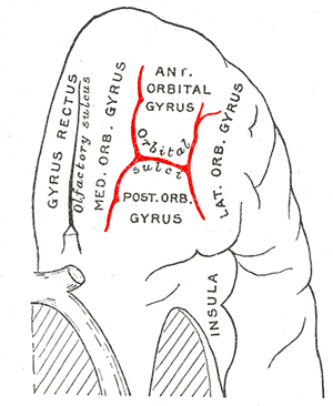 orbital sulcus.